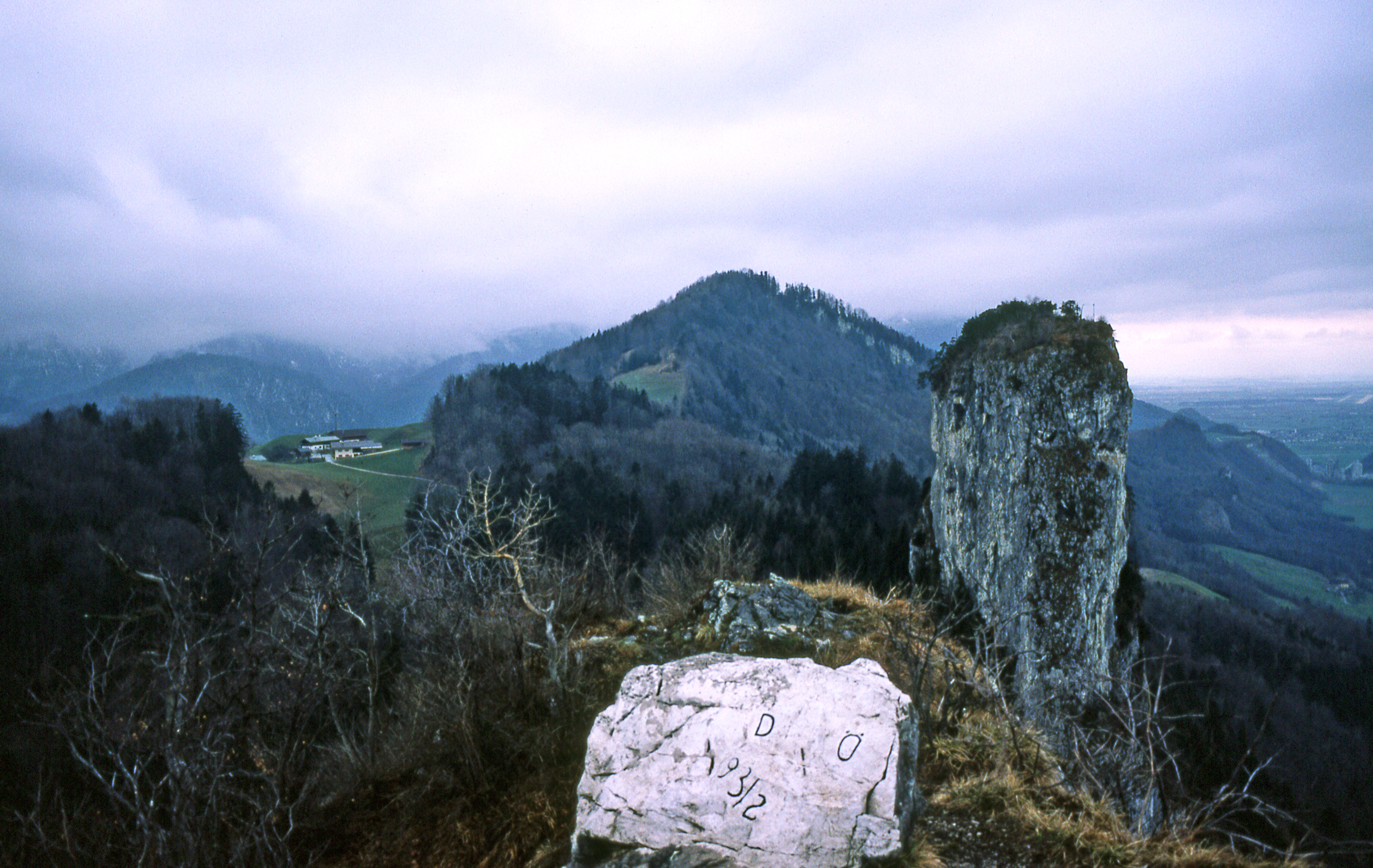 Hallein, Kleiner Barmstein, Grenzzeichen D/A (1981)